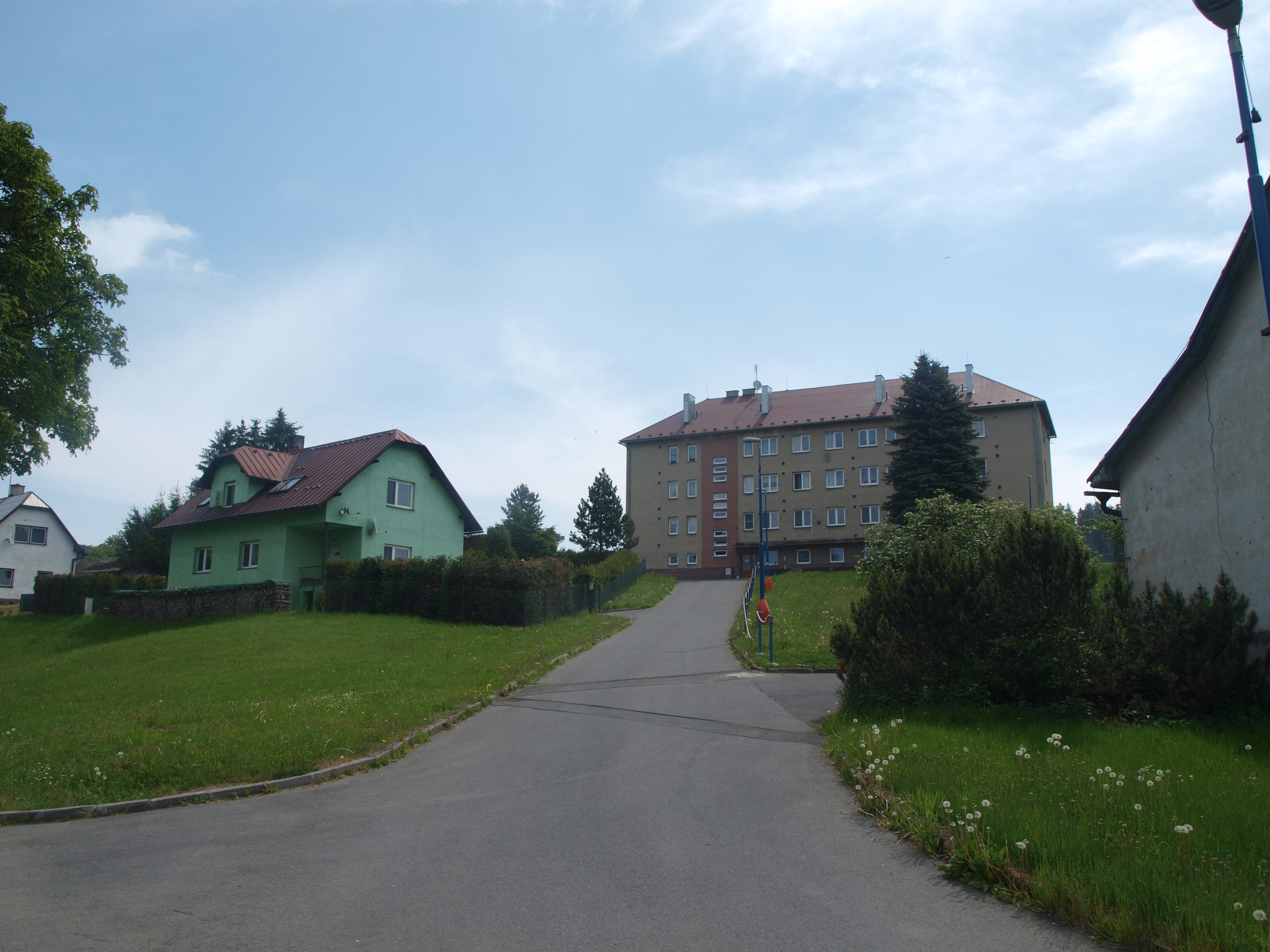 Domy v obci Malá Štáhle